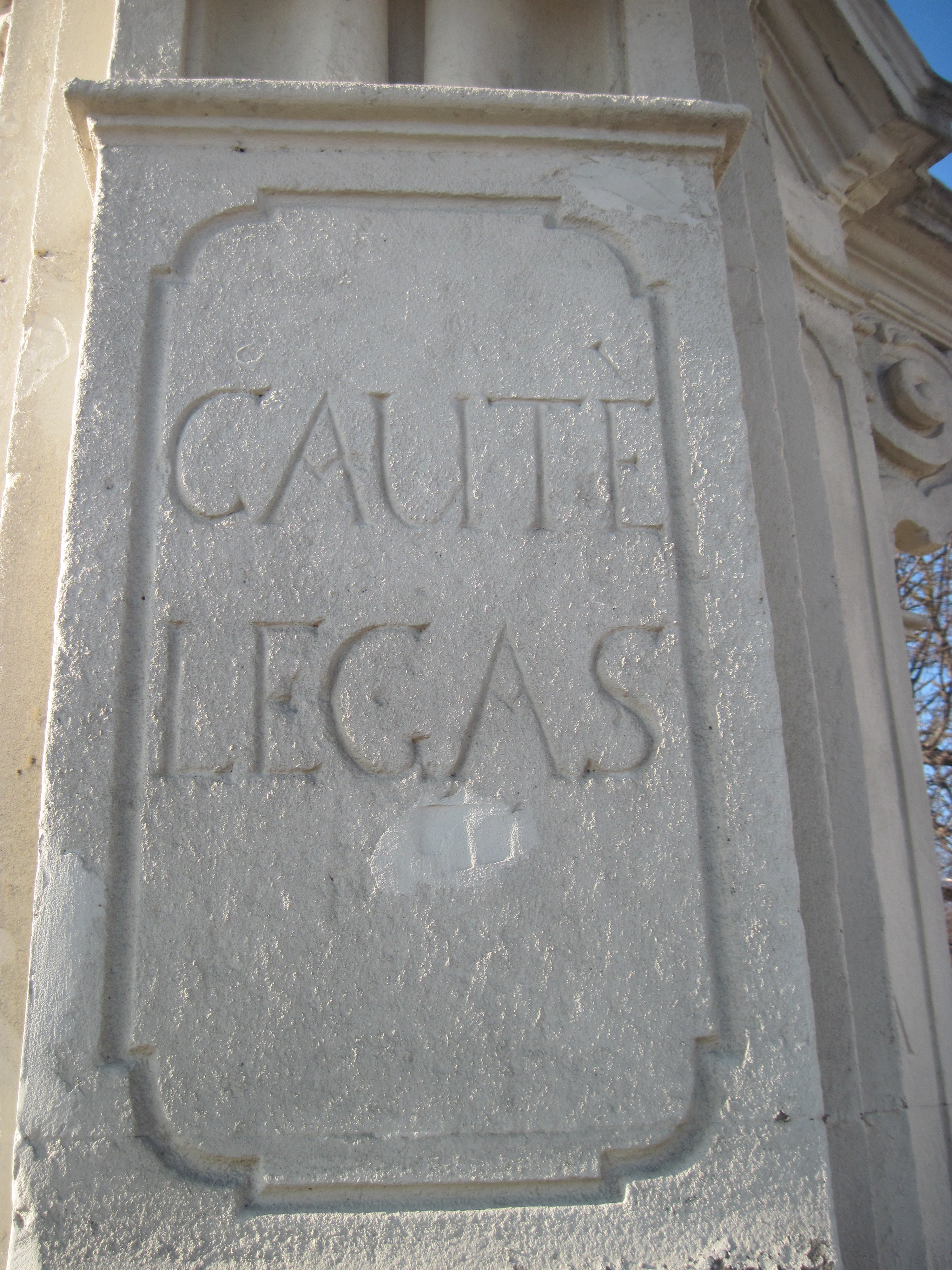 Статуя ПДМ, Бучач, 2015